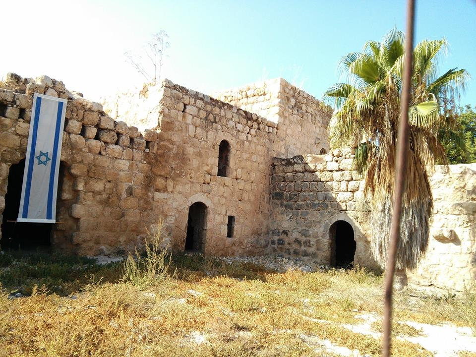 מושב בשפלת יהודה ליד העיר בית שמש השייך למועצה אזורית מטה יהודה. בתחילת שנת 1913 החבורת סג'רה שכללה 13 חברים באה ליישב את המקום, ושהתה במקום קרוב לשנה. החאן בו התגוררו בני החבורה נותר עד היום בלב היישוב. שמו ניתן לו בעקבות דמיון הצלילים לשמה של ח'ירבת כפרוריה, חורבה הממוקמת מדרום-מערב למושב, ובה גת חצובה, רצפת פסיפס ומערות קבורה. משמעות השם בערבית הוא "חורבת כפיר האריות". כאן, על פי מסורת מקומית, שיסע שמשון את האריה בדרכו להוריו בתמנה.